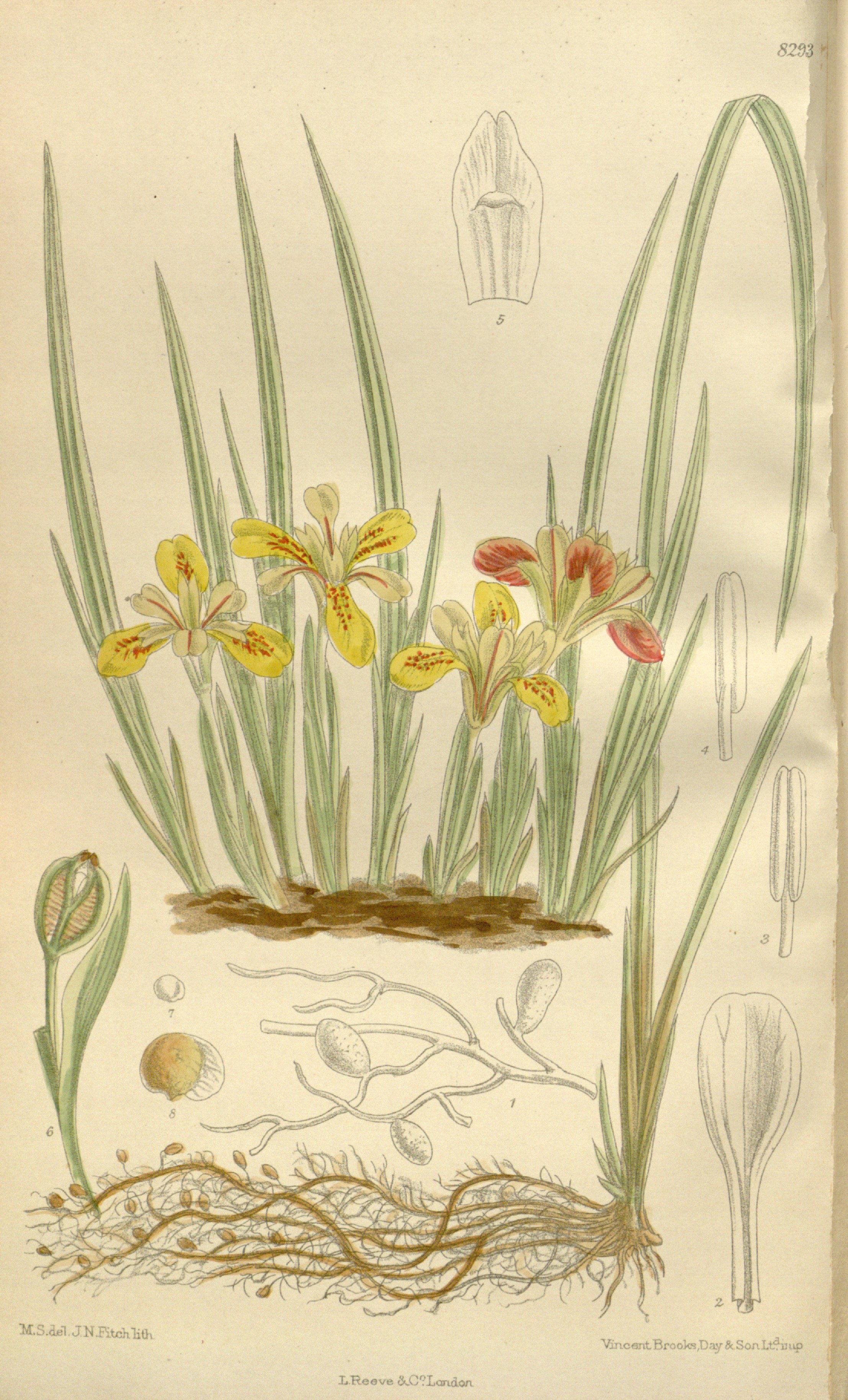 Iris minuta (= Iris minutoaurea), Iridaceae